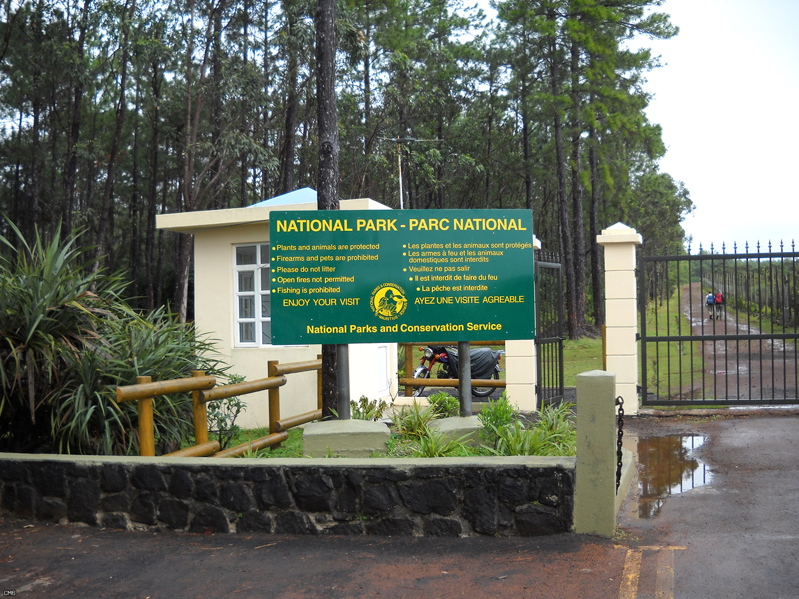 Pétrin